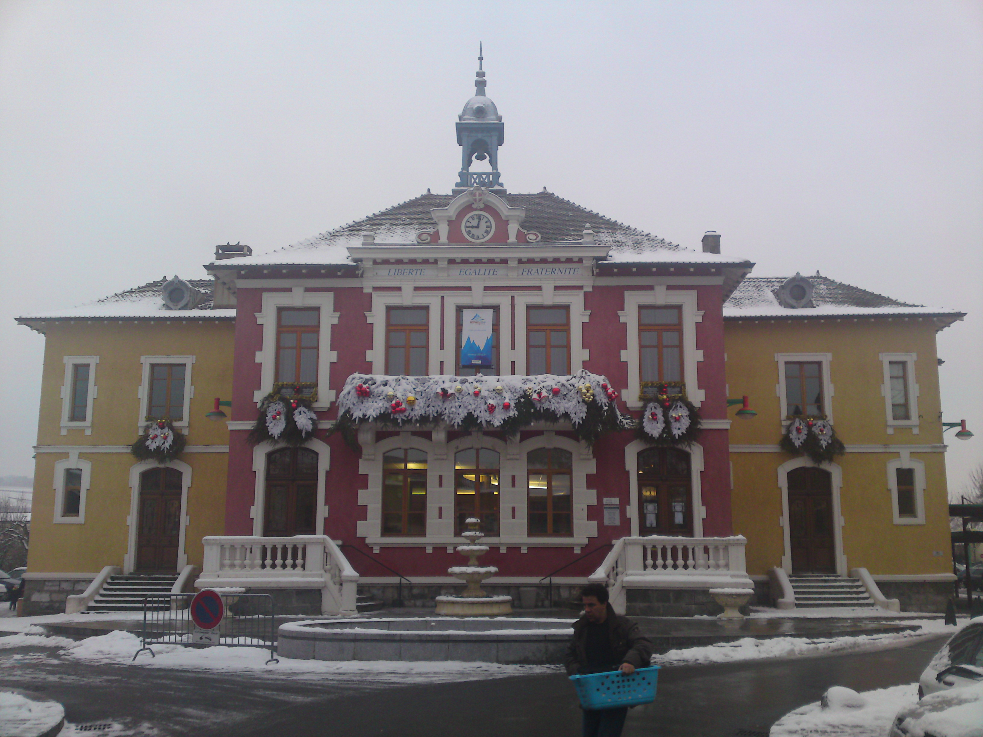 Mairie de Douvaine, en Haute-Savoie, France